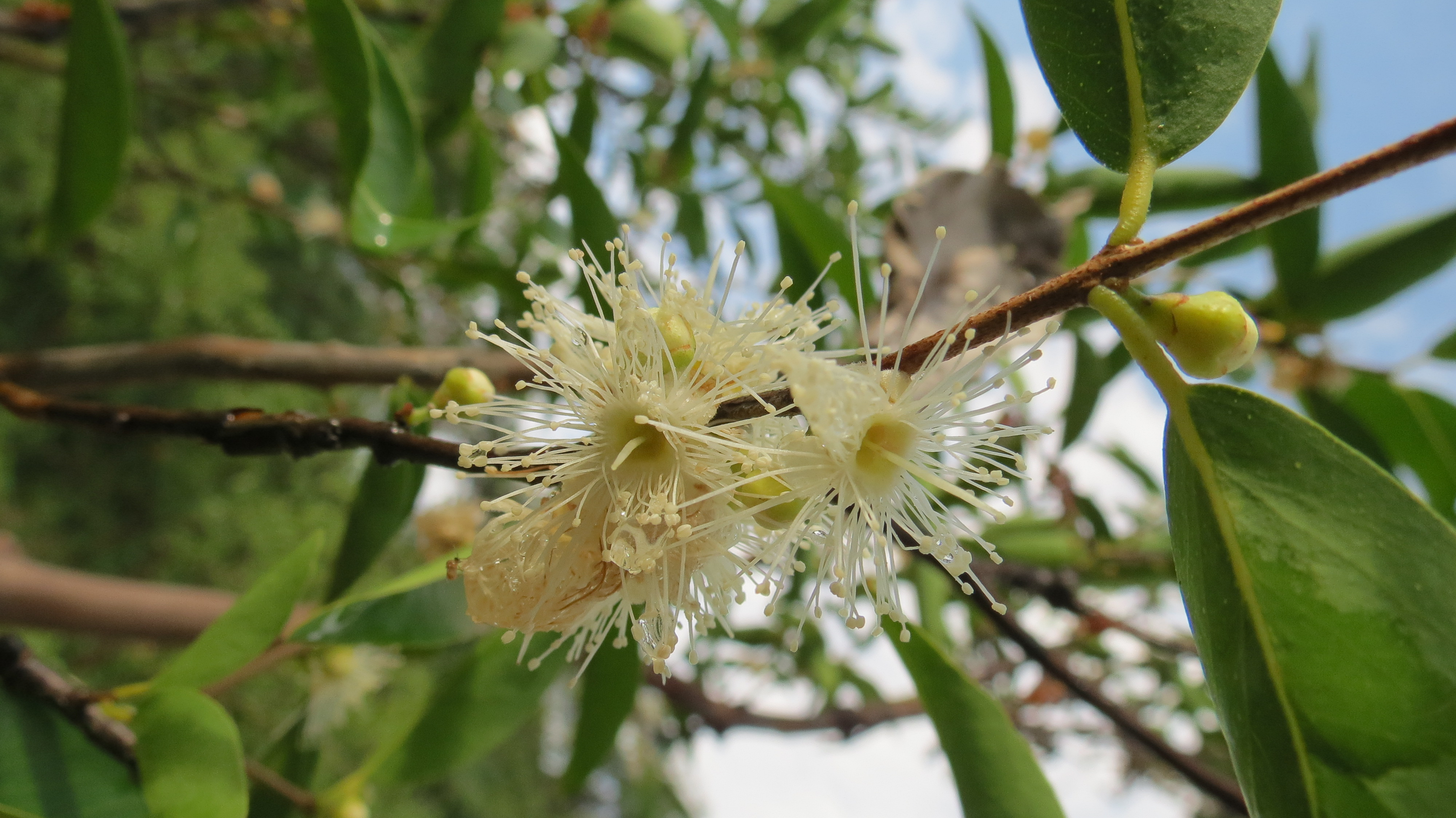 Myrciaria dubia, popularmente conhecido como camu-camu, da família Myrtaceae.